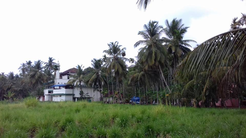 Papattungal masjid